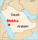 Beschreiwung: Positioun vu Mekka a Saudi-Arabien.